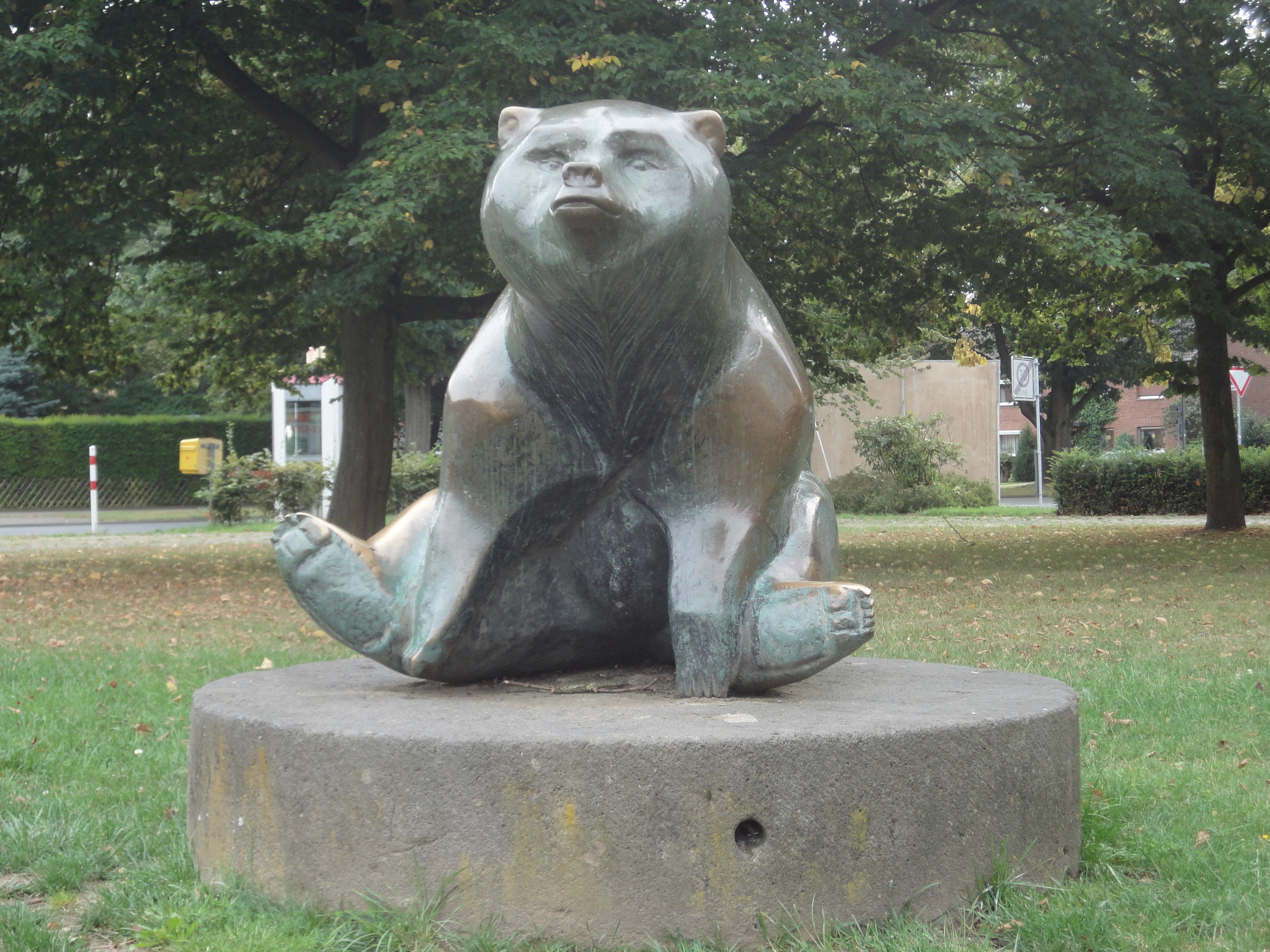 Bärenplastik von Anneliese Langenbach nach Insterburger Wappentier auf Insterburger Platz in Krefeld, 1959